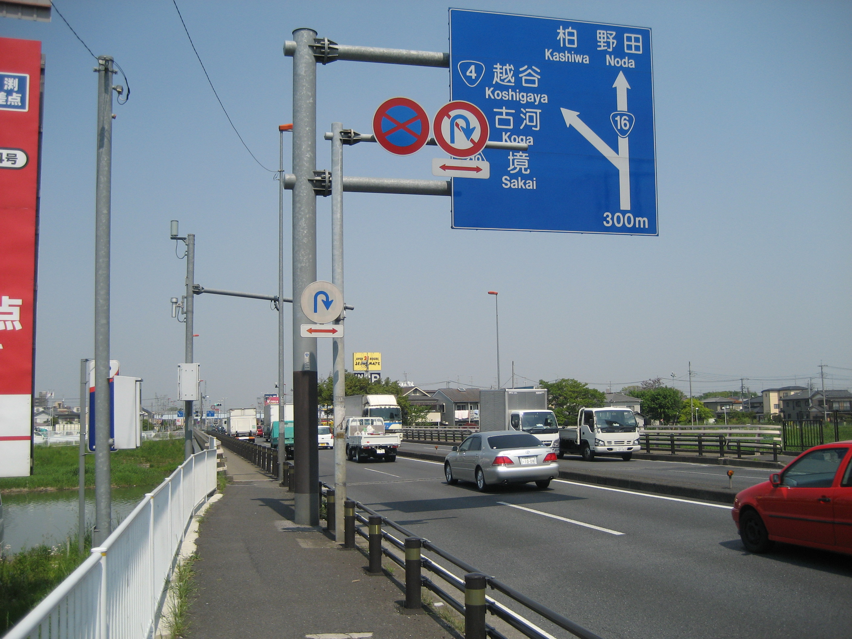 国道16号線埼玉県春日部市春日部大橋